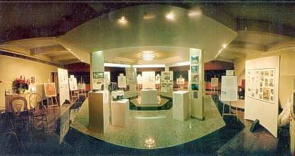 Exposição "Imagens de Um Pioneiro".